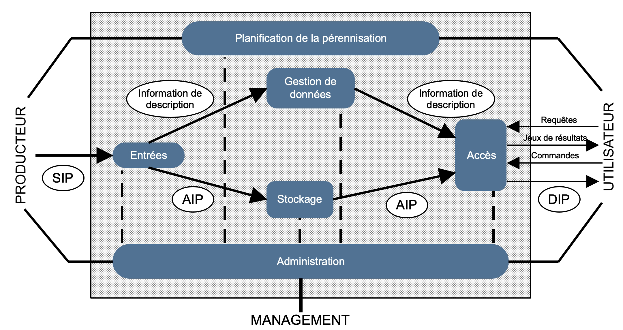 Figure illustrant les six entités fonctionnelles de la norme OAIS.